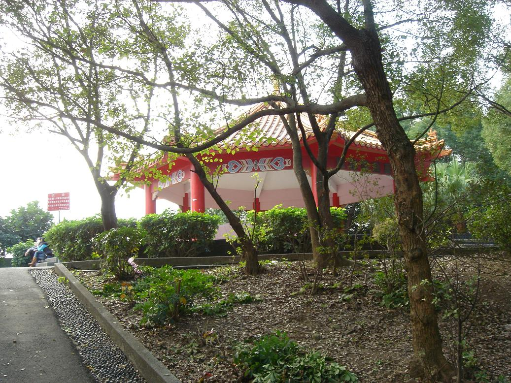 台北縣中和市員山公園山頂涼亭